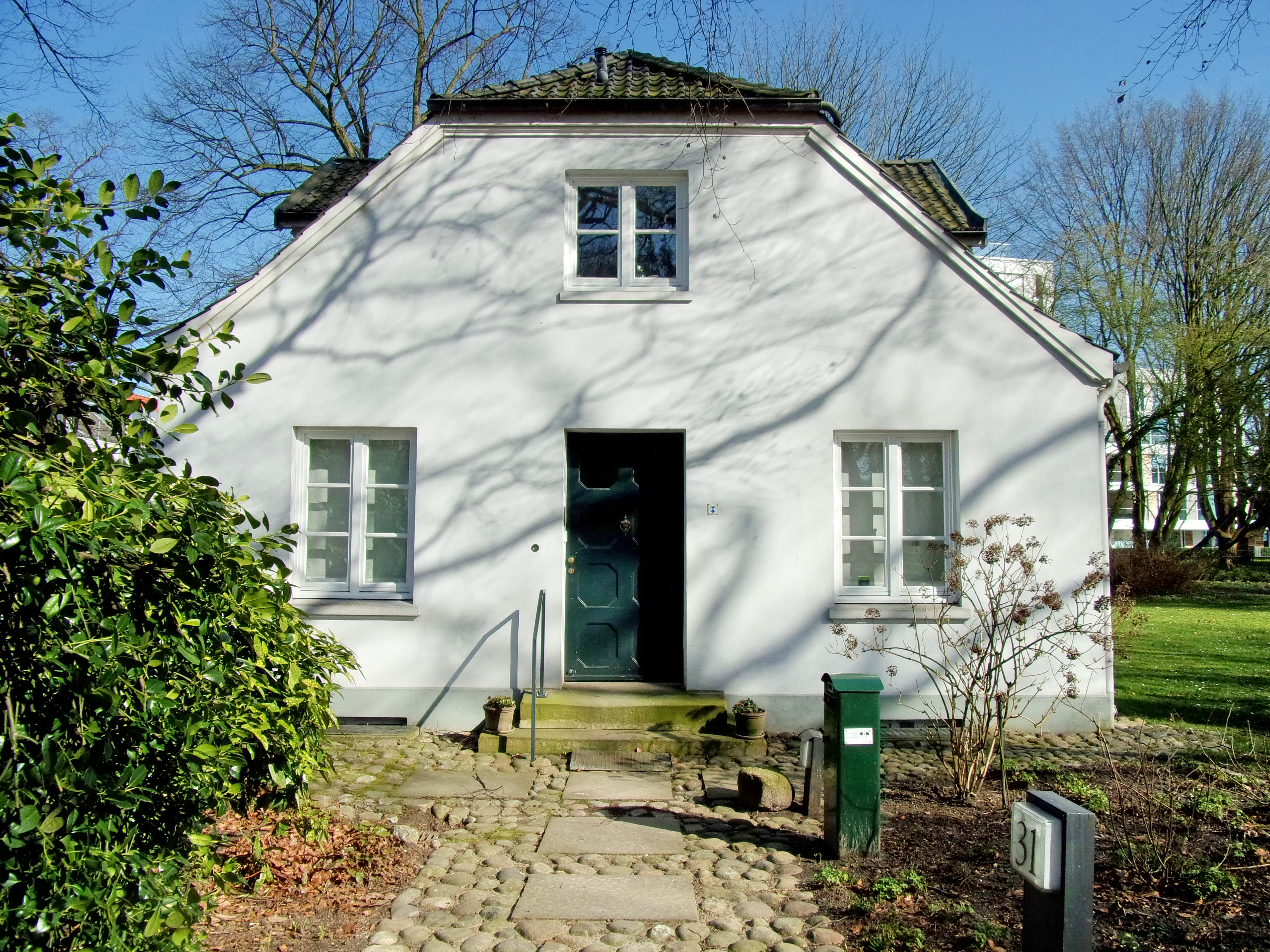 Zum denkmalgeschützten Ensembles des Heine-Parks an der Elbchaussee gehört neben der Plangeschen Villa und dem Wohnhaus auch das ehemalige Gartenhaus, Elbchaussee 31. Erbaut ca 1832 und heutige Außenstelle des Altonaer Museums. Im Foto der Eingangsbereich mit Wegpflasterung. This is a photograph of an architectural monument.